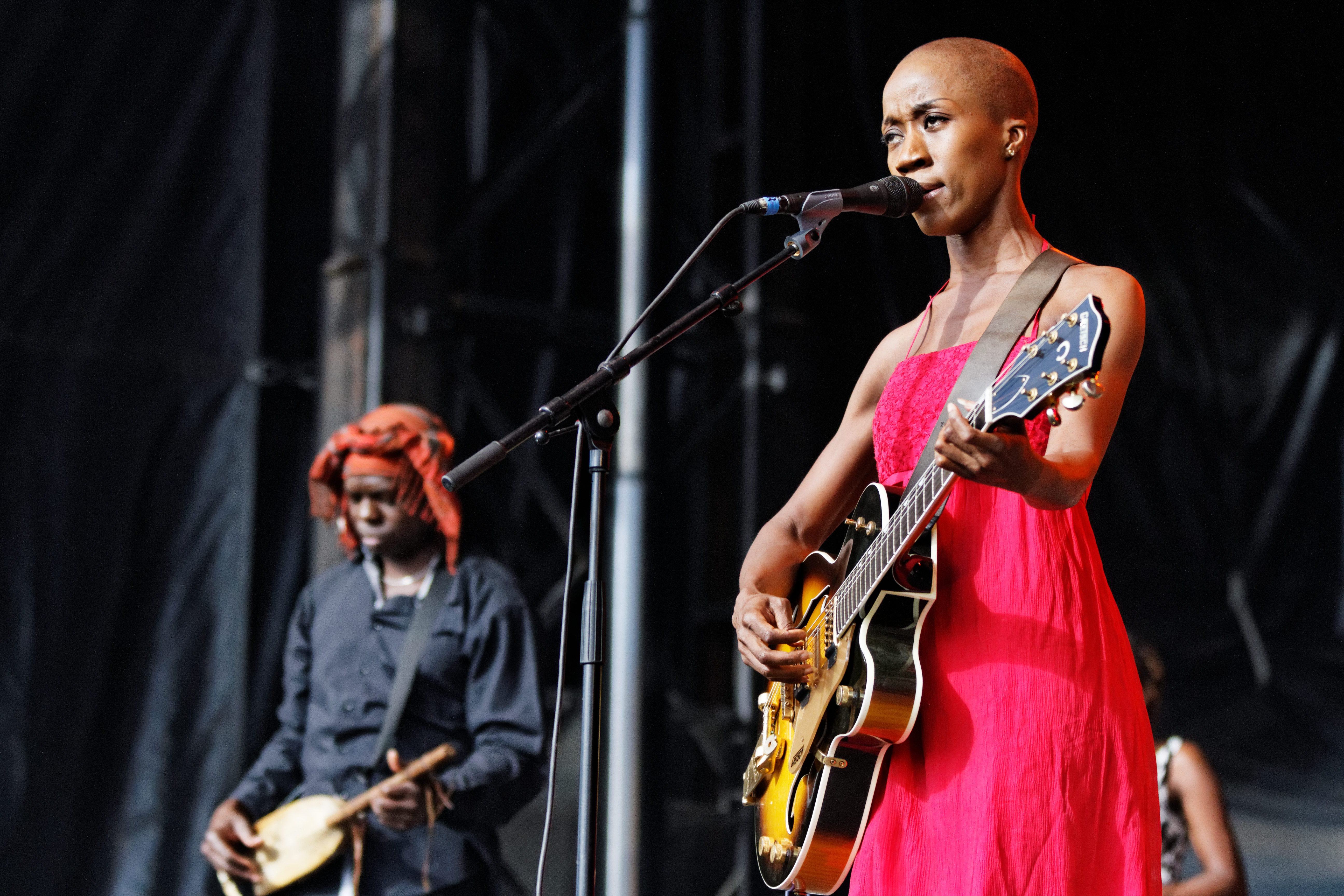 Rokia Traoré en concert sur la scène Landaoudec lors du festival du bout du Monde à Crozon dans le Finistère (France).